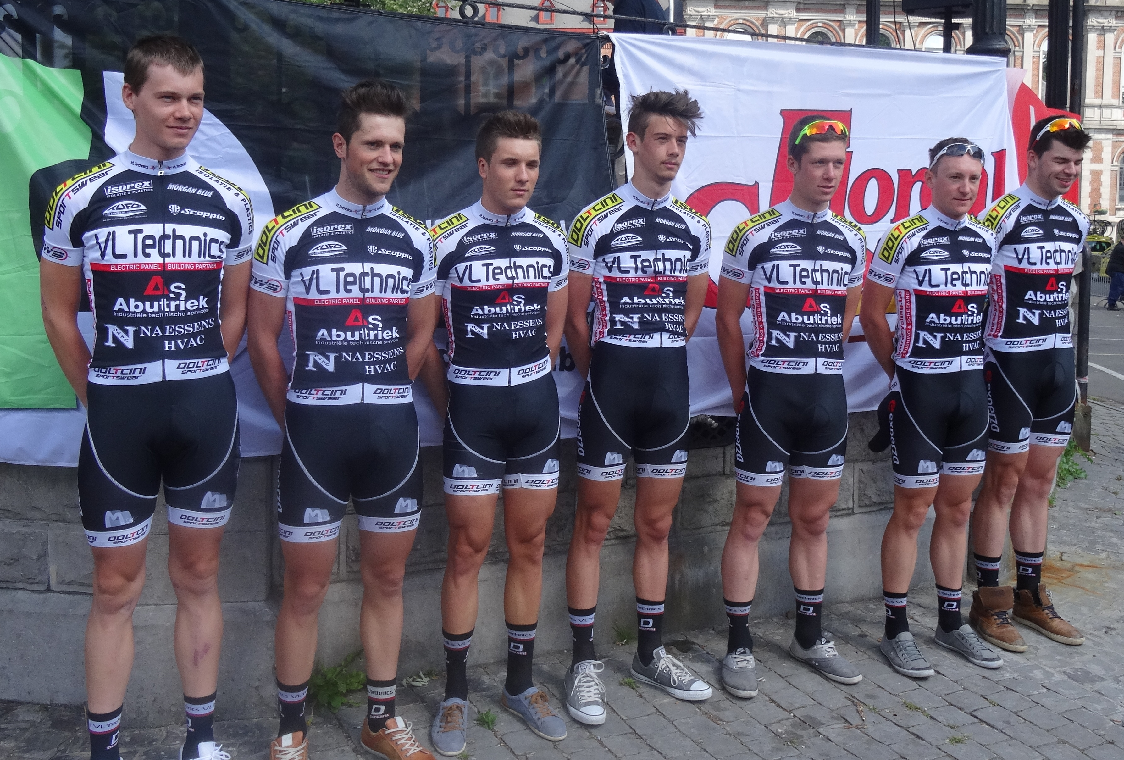 Reportage réalisé le samedi 17 mai à l'occasion du départ du Grand Prix Criquielion 2014 à Boussu, Belgique.